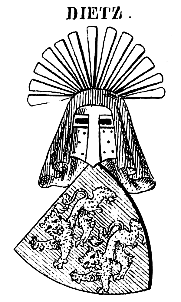 Stammwappen der Grafen von Dietz (nach Siegel v. 1308)